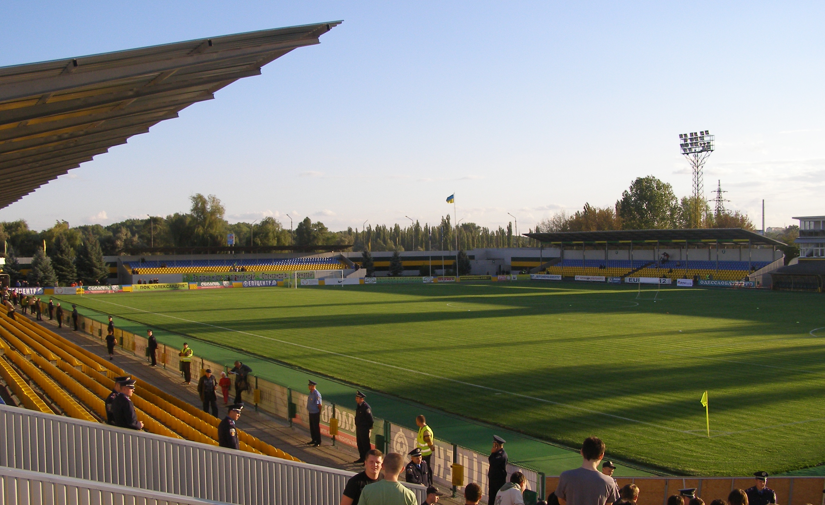 Культурно-спортивний комплекс «Ніка» (Олександрія)